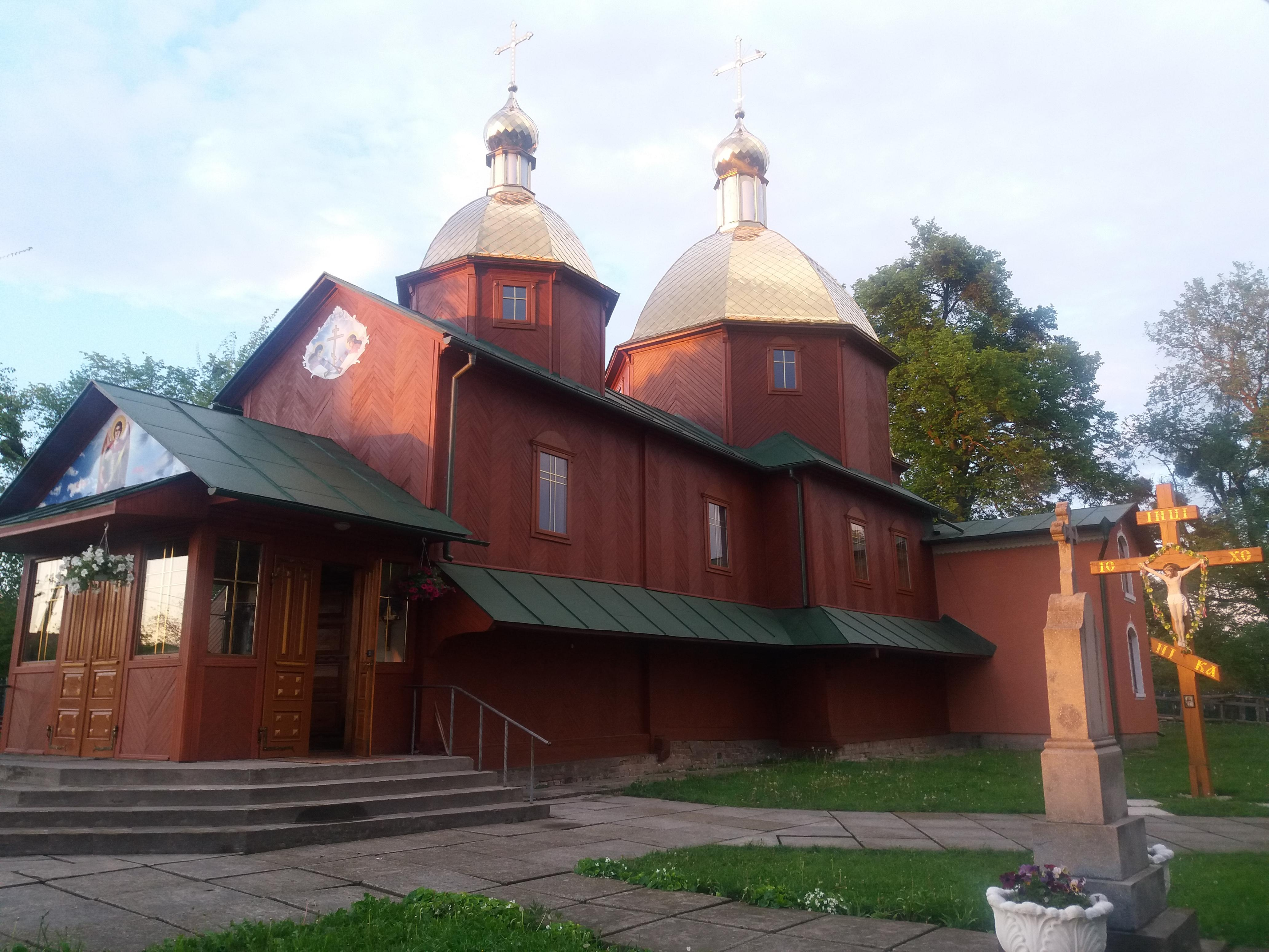 Церква св. арх. Михаїла в с. Первятичі після реставрації 2016 р.